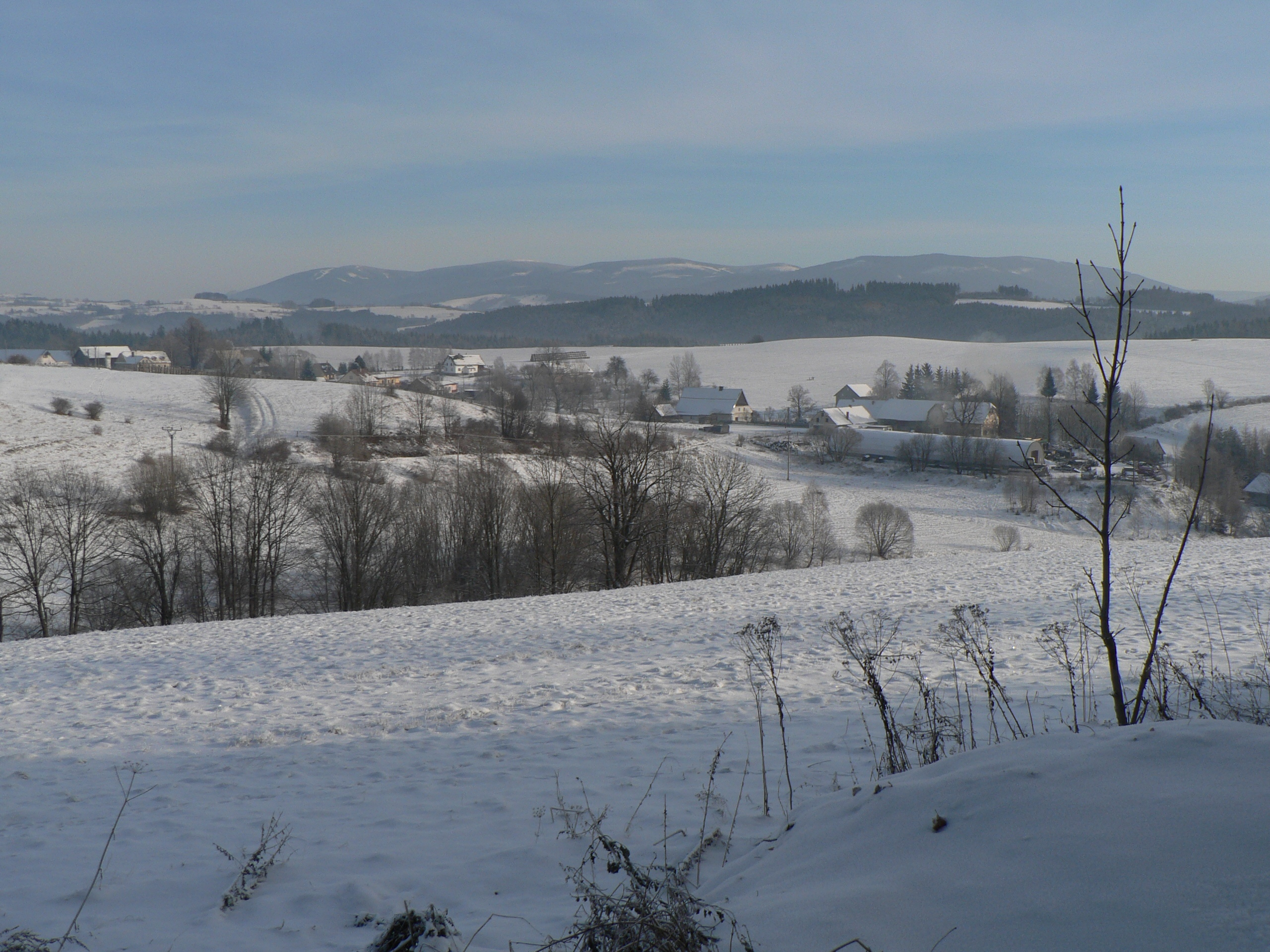 Vysoké Žibřidovice - horní část obce